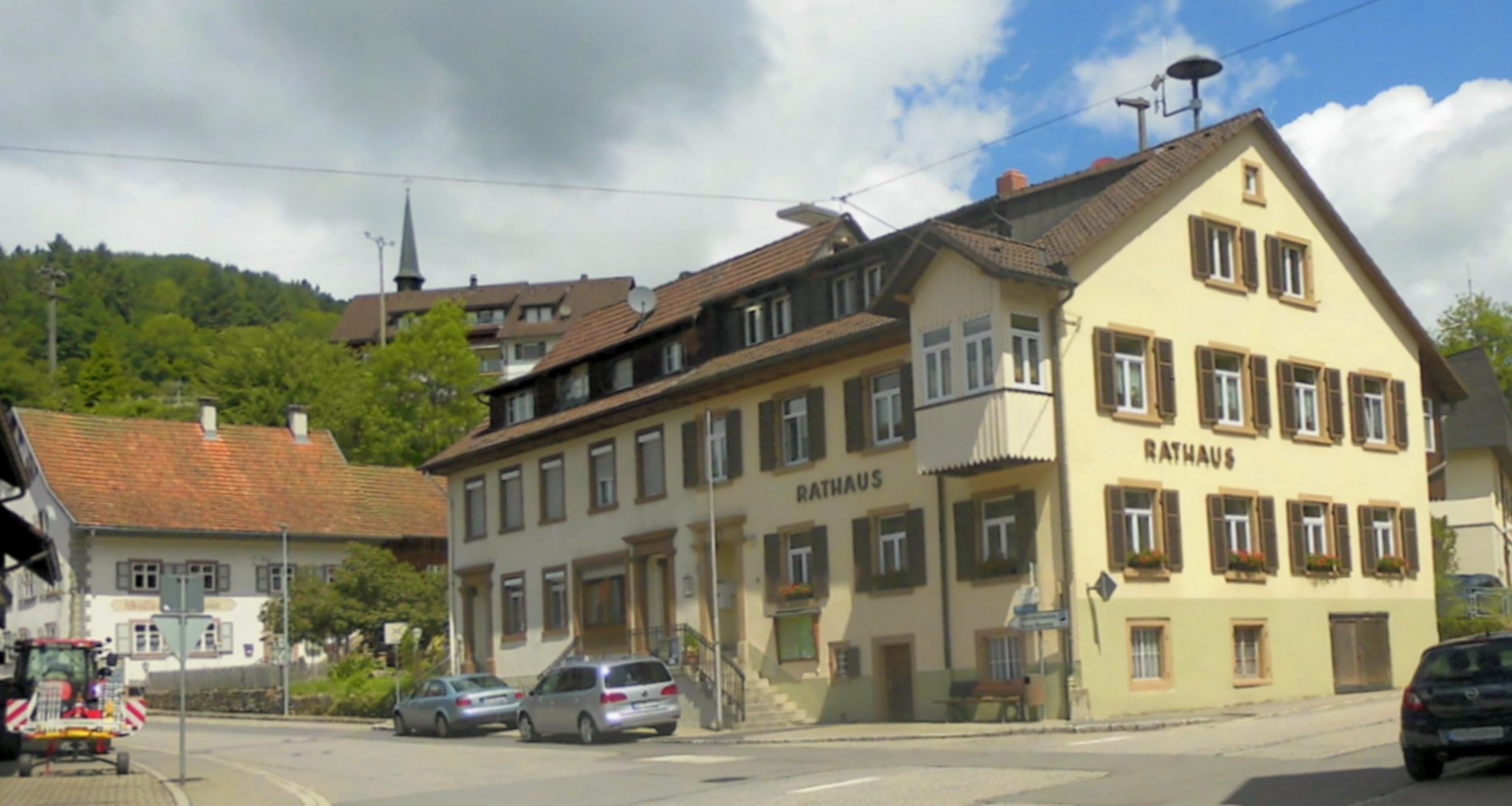 Rathaus der Gemeinde Kleines Wiesental in Tegernau, Baden-Württemberg